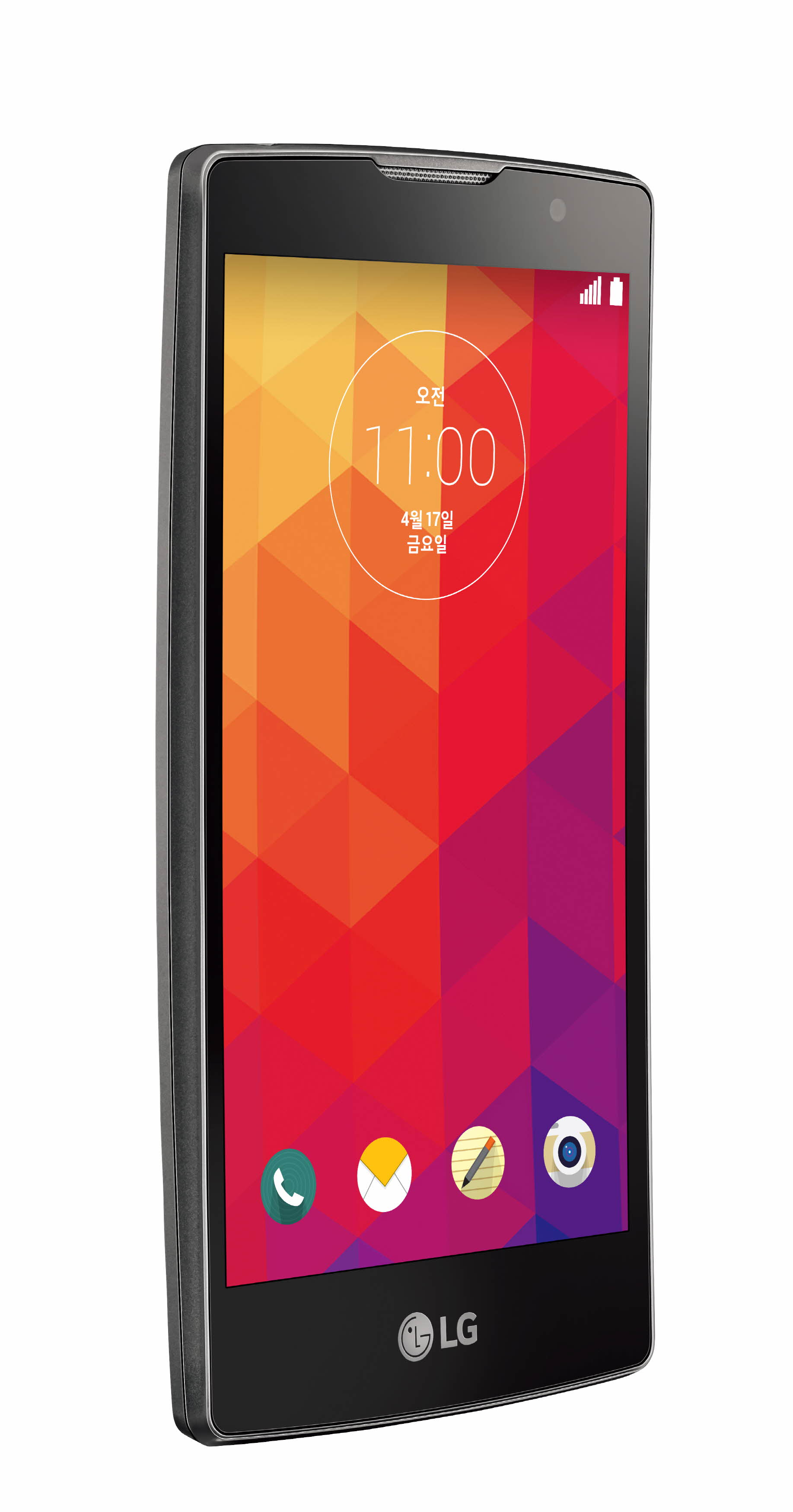 LG전자, 부드러운 곡면디자인 ‘LG 볼트’ 출시 ■ 3,000R 곡률의 ‘인셀터치’ 디스플레이 탑재 ■ ‘제스처 샷’, ‘글랜스 뷰’ 등 ‘G 시리즈’ 대표 UX(사용자경험) 적용 ■ 출고가 20만원 대 대비 높은 성능 갖춘 실속형 제품 ※ Social LG전자 ( 에서 관련 보도자료를 확인하실 수 있습니다.